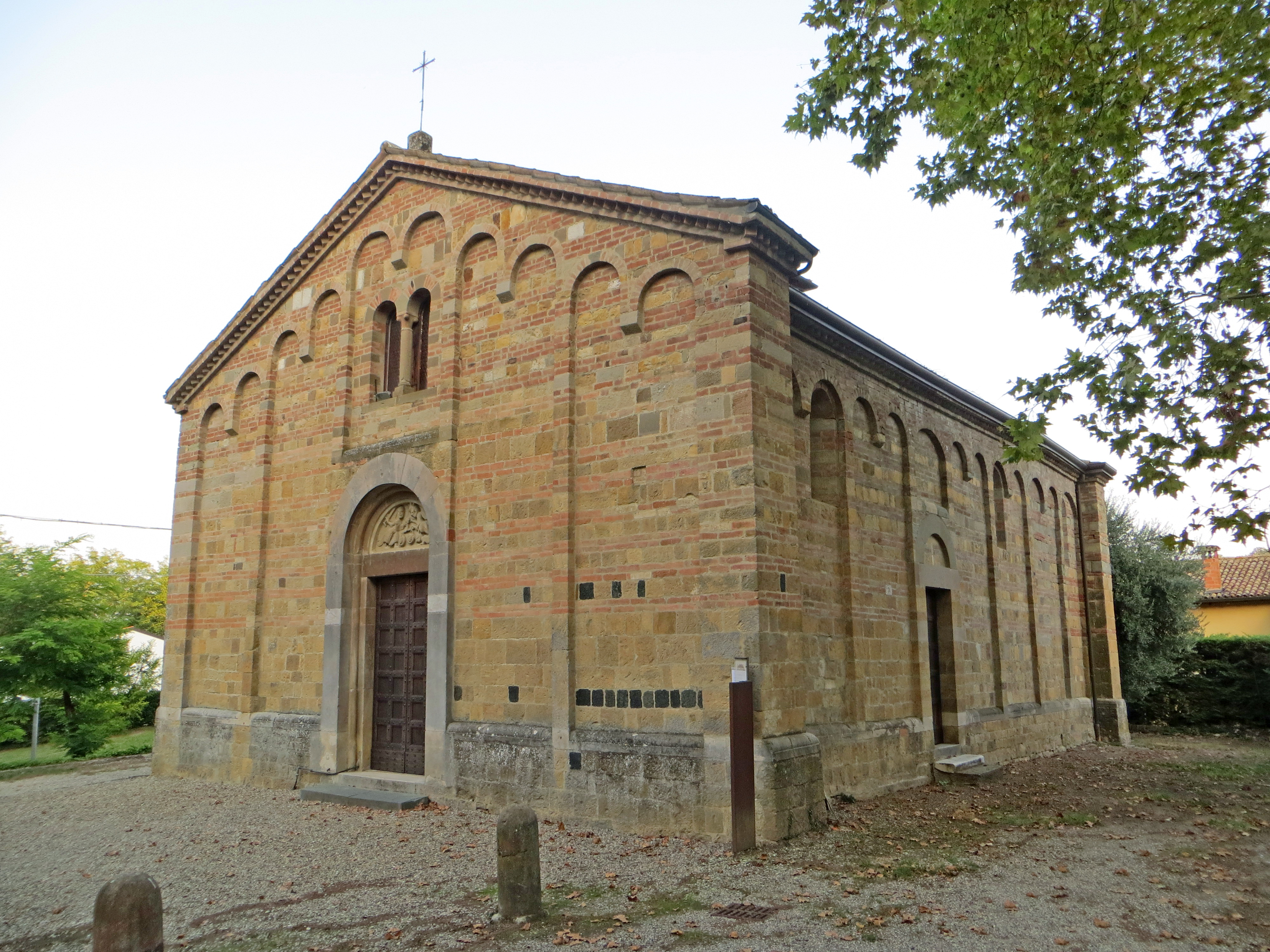 Facciata e lato sud della pieve di San Biagio This is a photo of a monument which is part of cultural heritage of Italy.